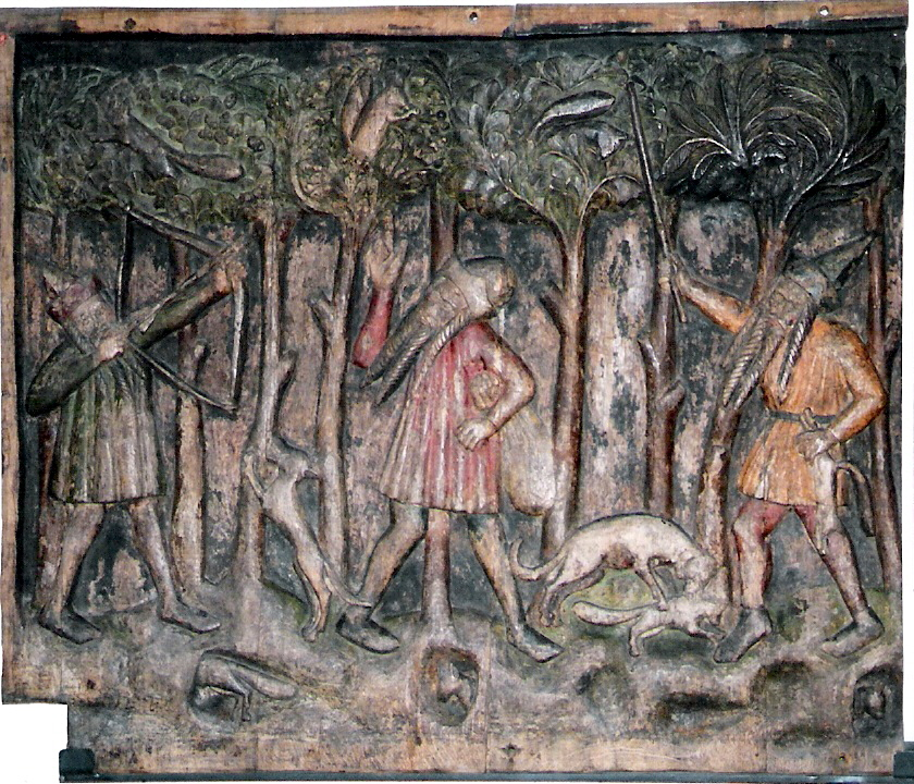 Stralsund (Germany), Nikolaikirche, Russlandfahrergestühl, Tafel A (BCD) Fotograf: Klugschnacker, 2006-07-xx